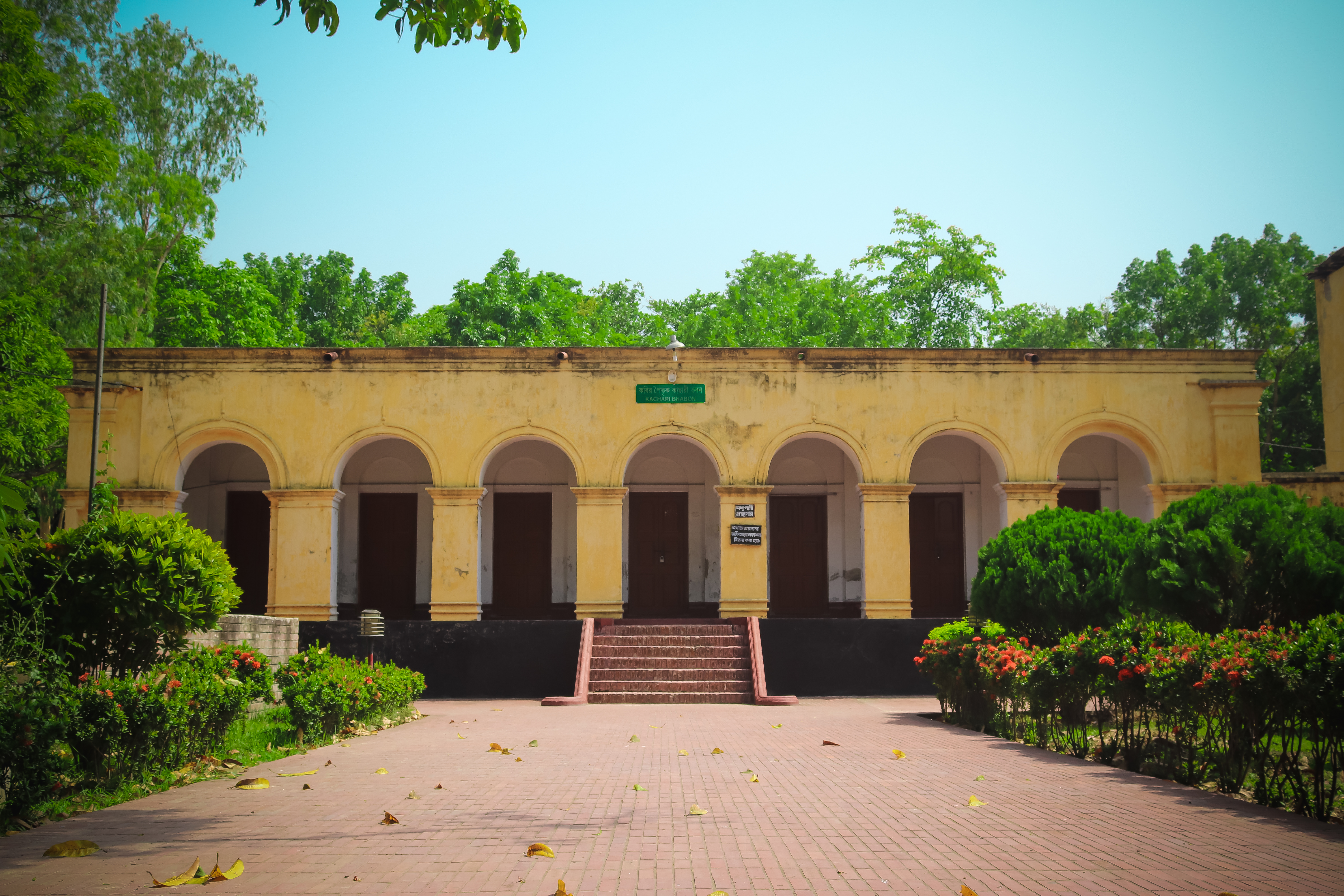 মাইকেল মধুসূদন দত্তের বাড়ি